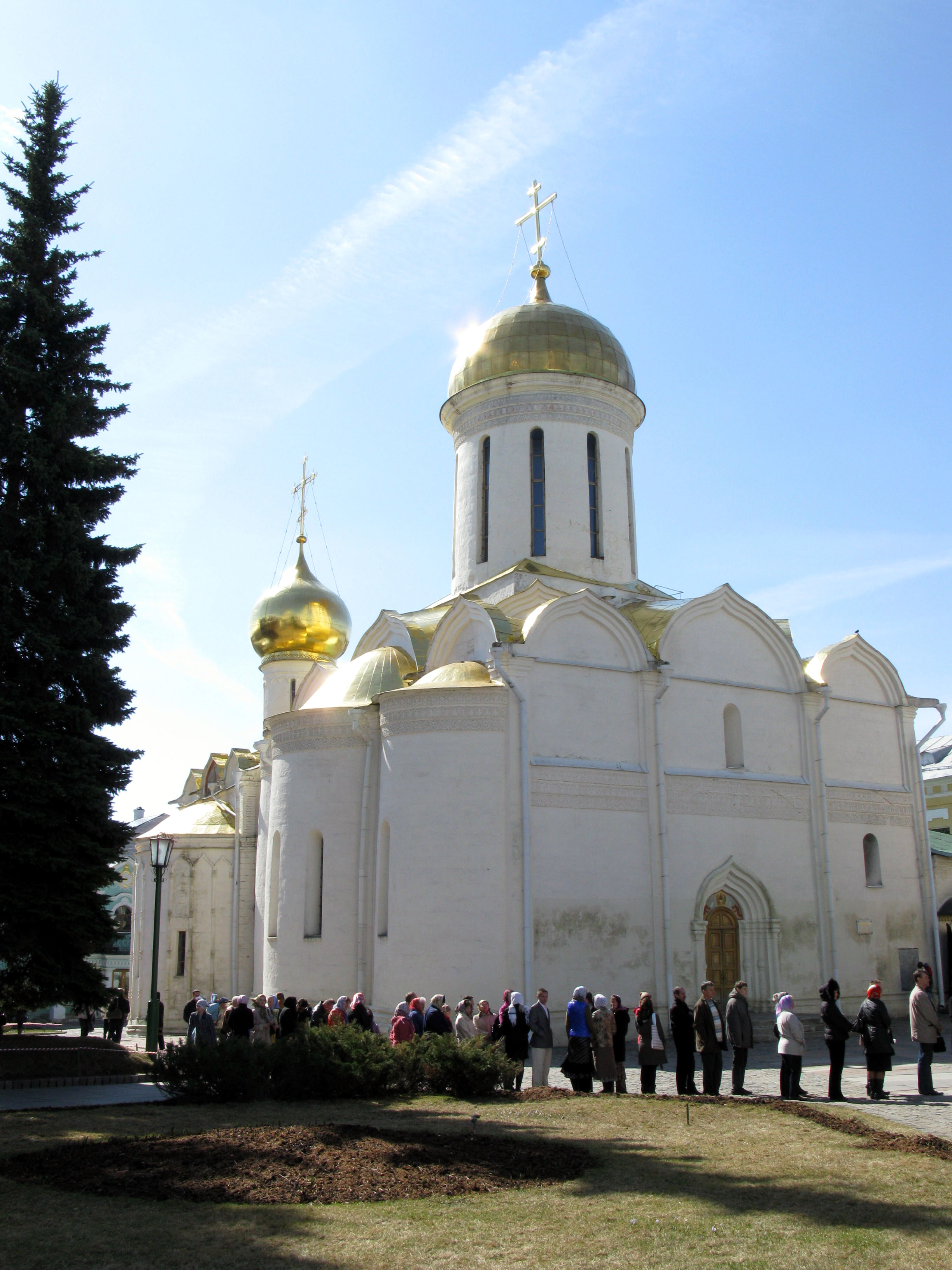 Троицкий собор Свято-Троицкой Сергиевой Лавры. 1422 год. С задней левой стороны видна Никоновская церковь. (Сергиев Посад)